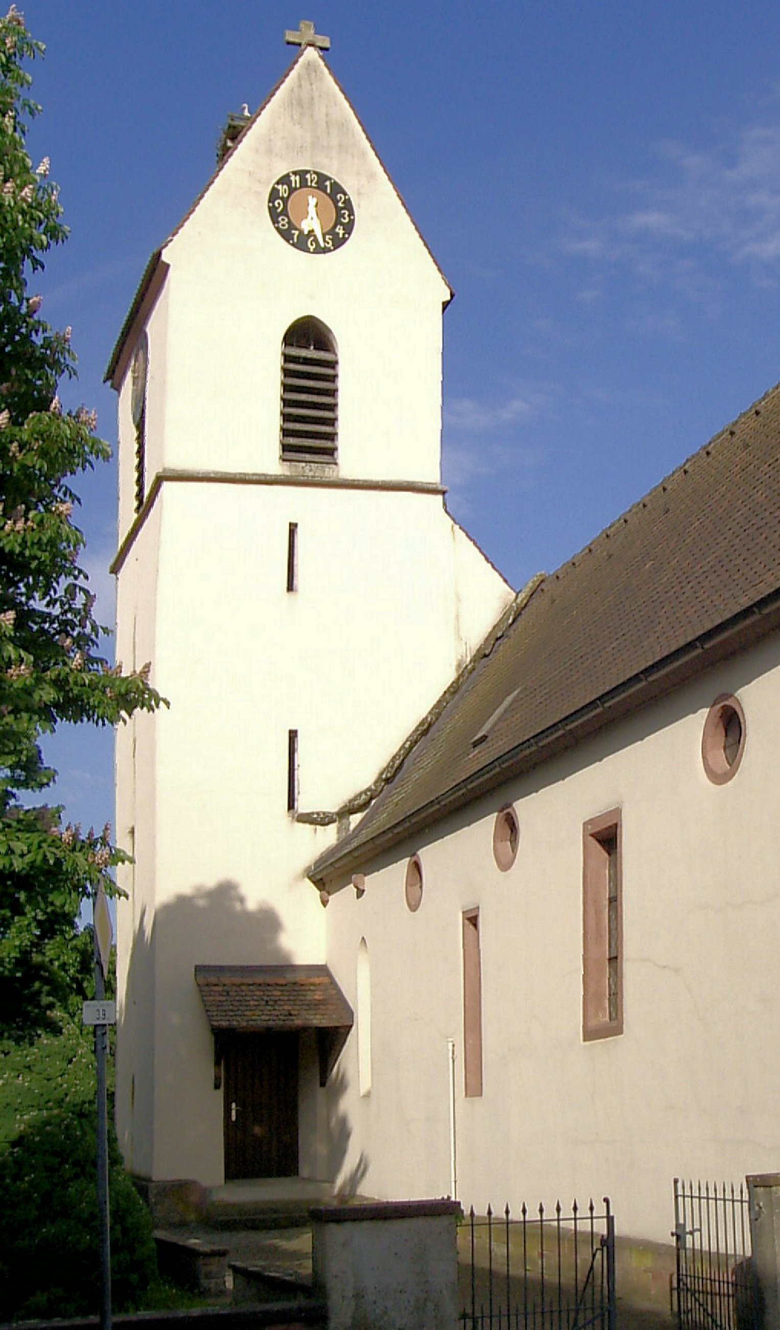 Kirche im Weiler Ortsteil Märkt